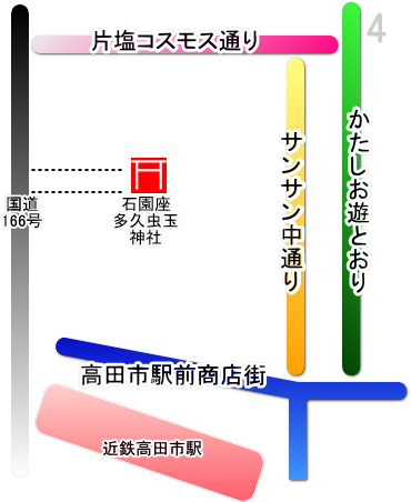 大和高田市片塩商店街の簡易地図。（ペイントソフトによる自作）